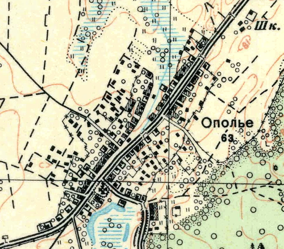 Топографическая карта Ленинградской области, квадрат О-35-22-Г-а (Керстово), деревня Ополье.